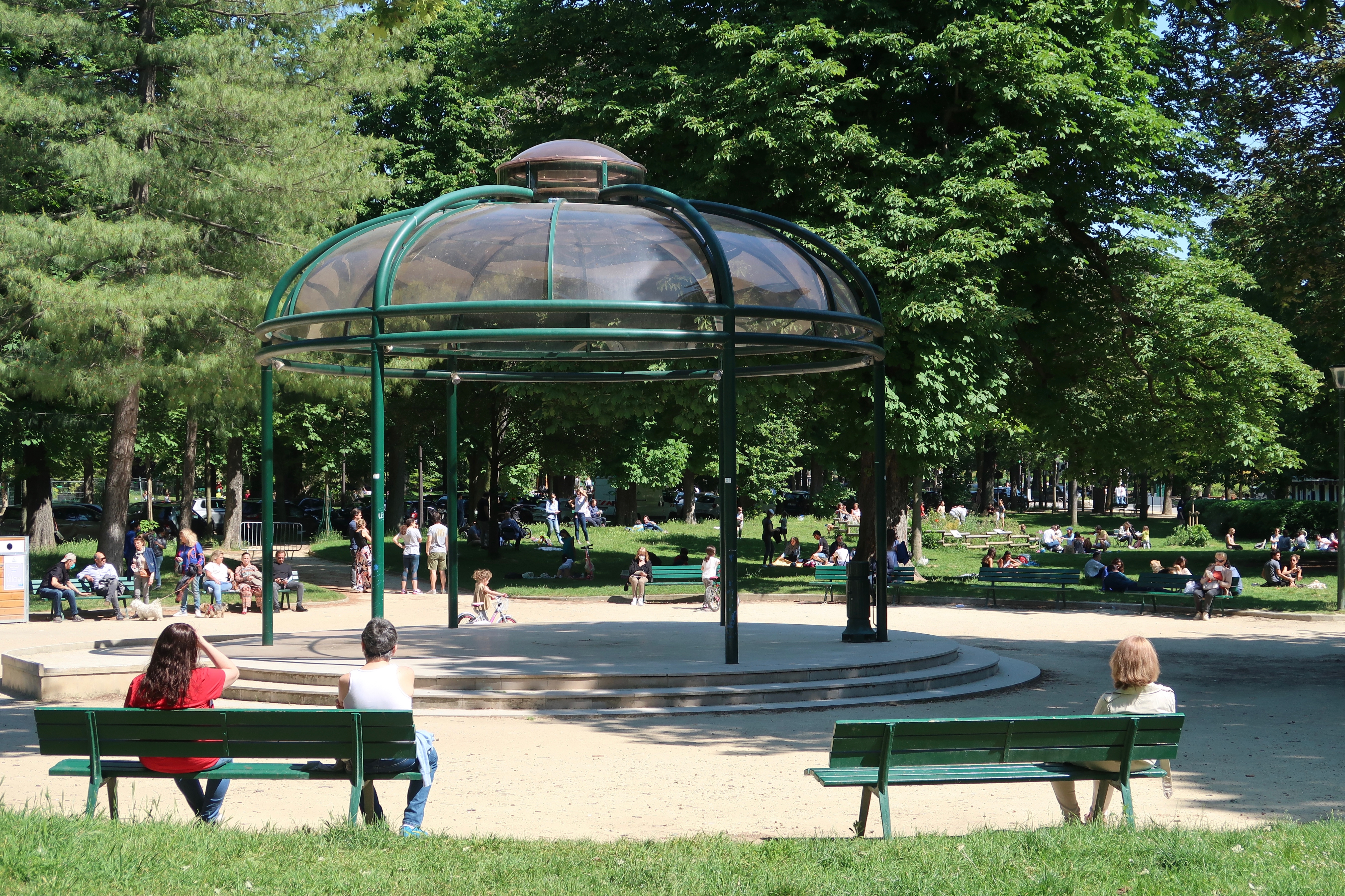 Jardin du Ranelagh (Paris, 16e).